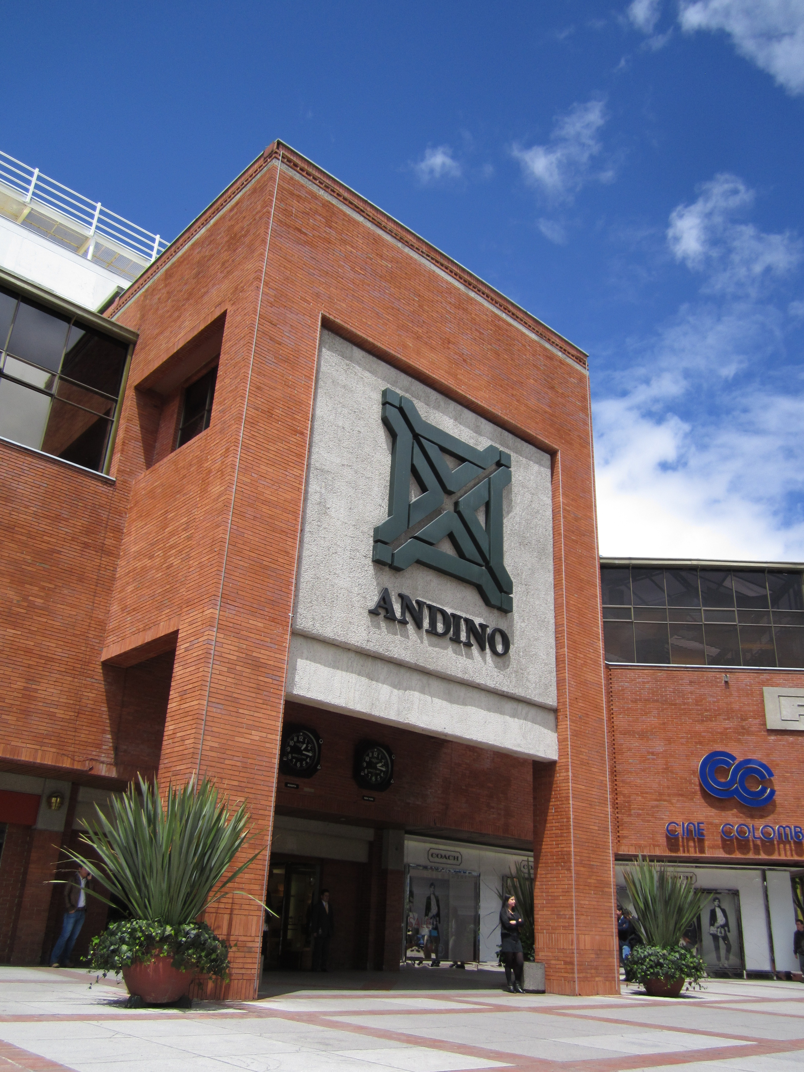 Bogotá entrada del centro comercial Andino, carrera 11 con calle 82.